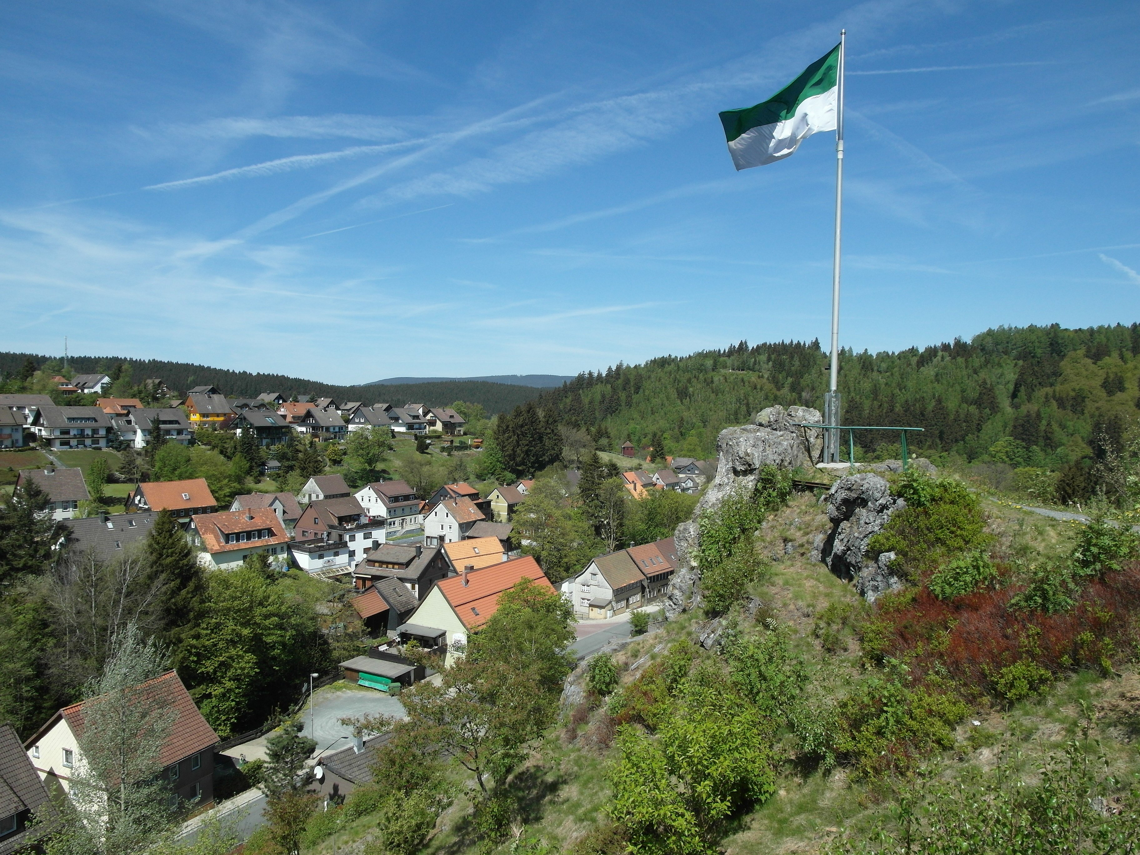 Auf der Schützenklippe in Altenau